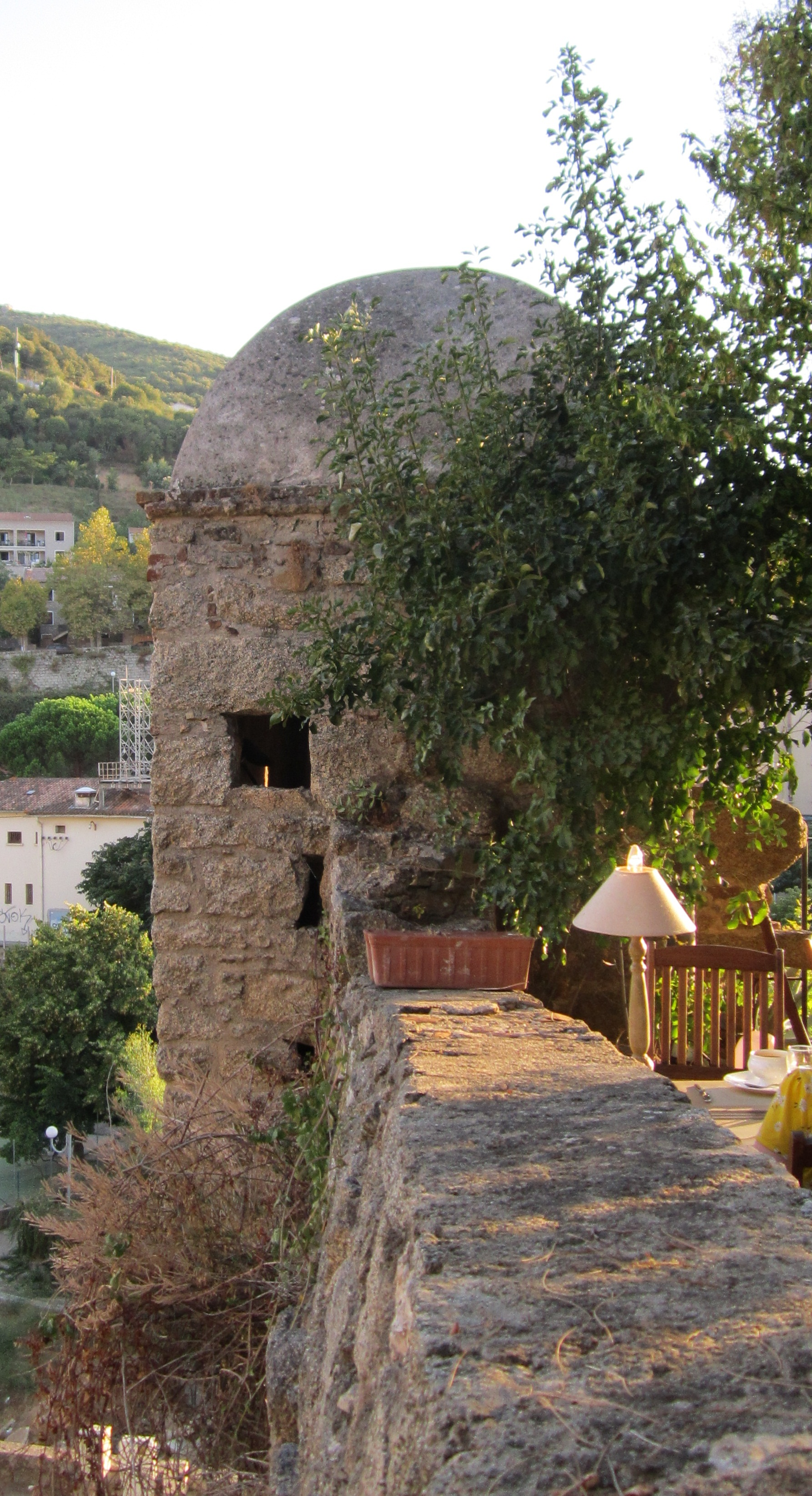 Échauguette de Sartène, Avenue Gabriel-Péri à Sartène, Corse (Inscrit, 1984) .